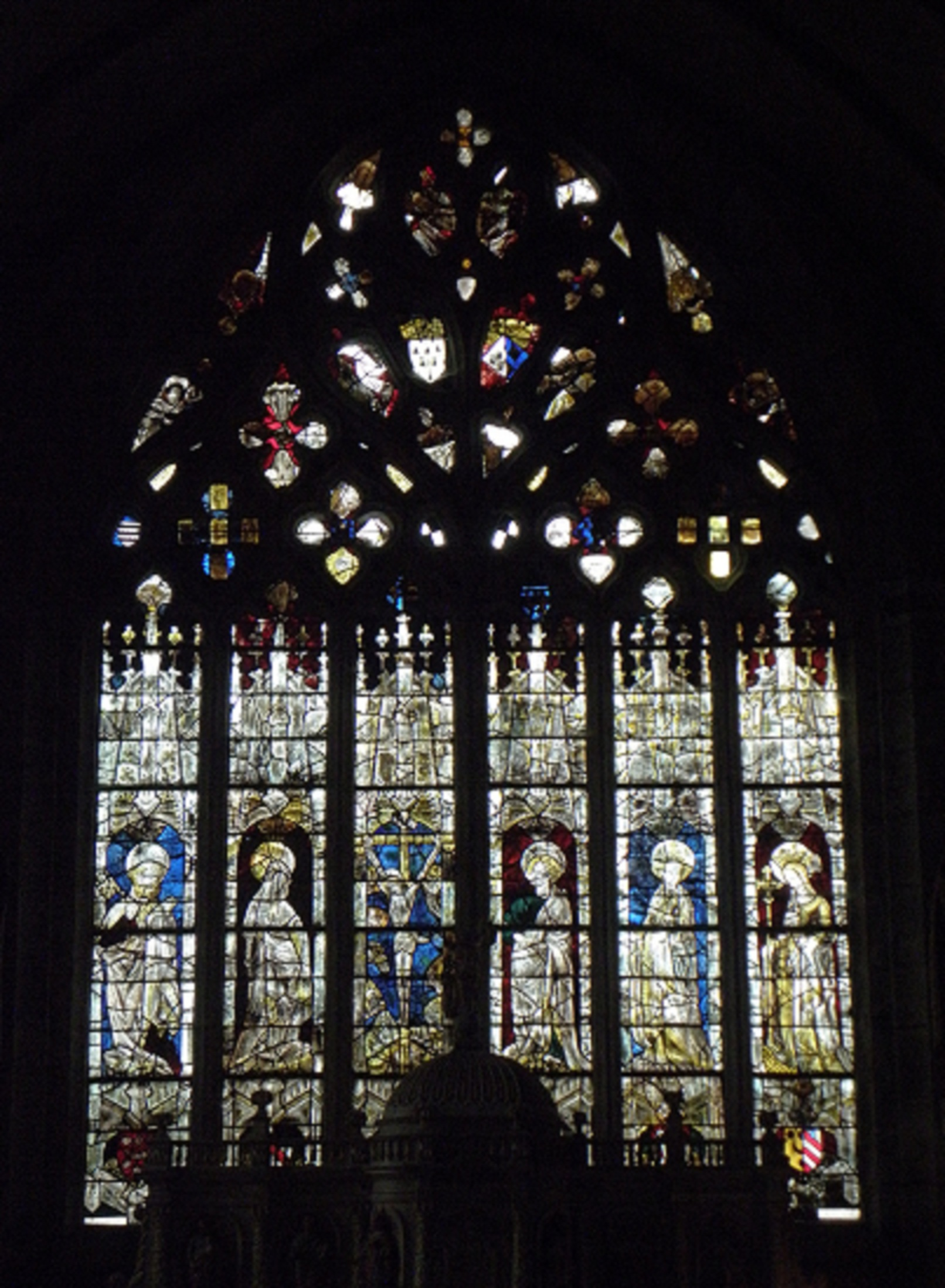 Maîtresse-vitre de l'église Notre-Dame de Runan (22).